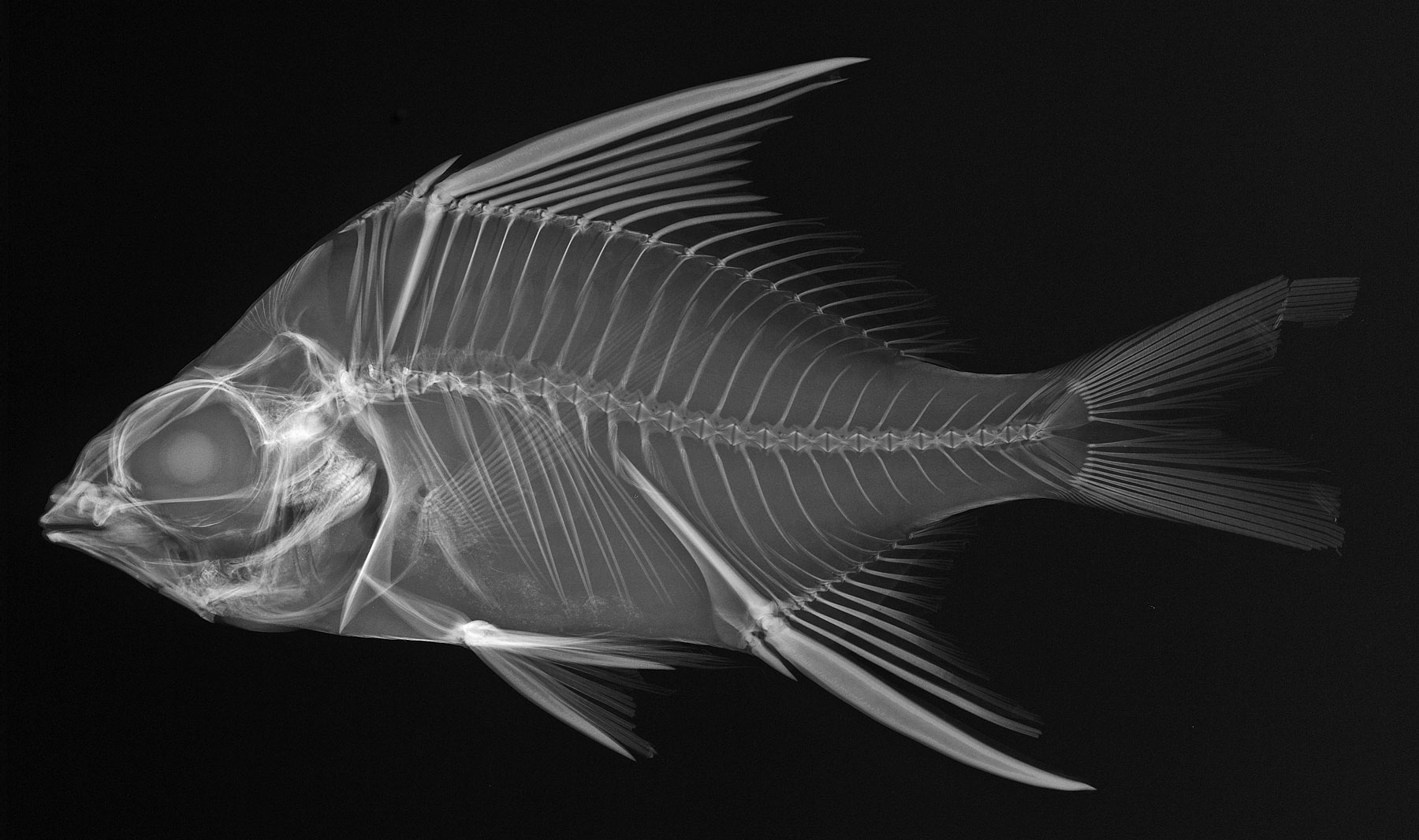 Eugerres plumieri, X-ray image